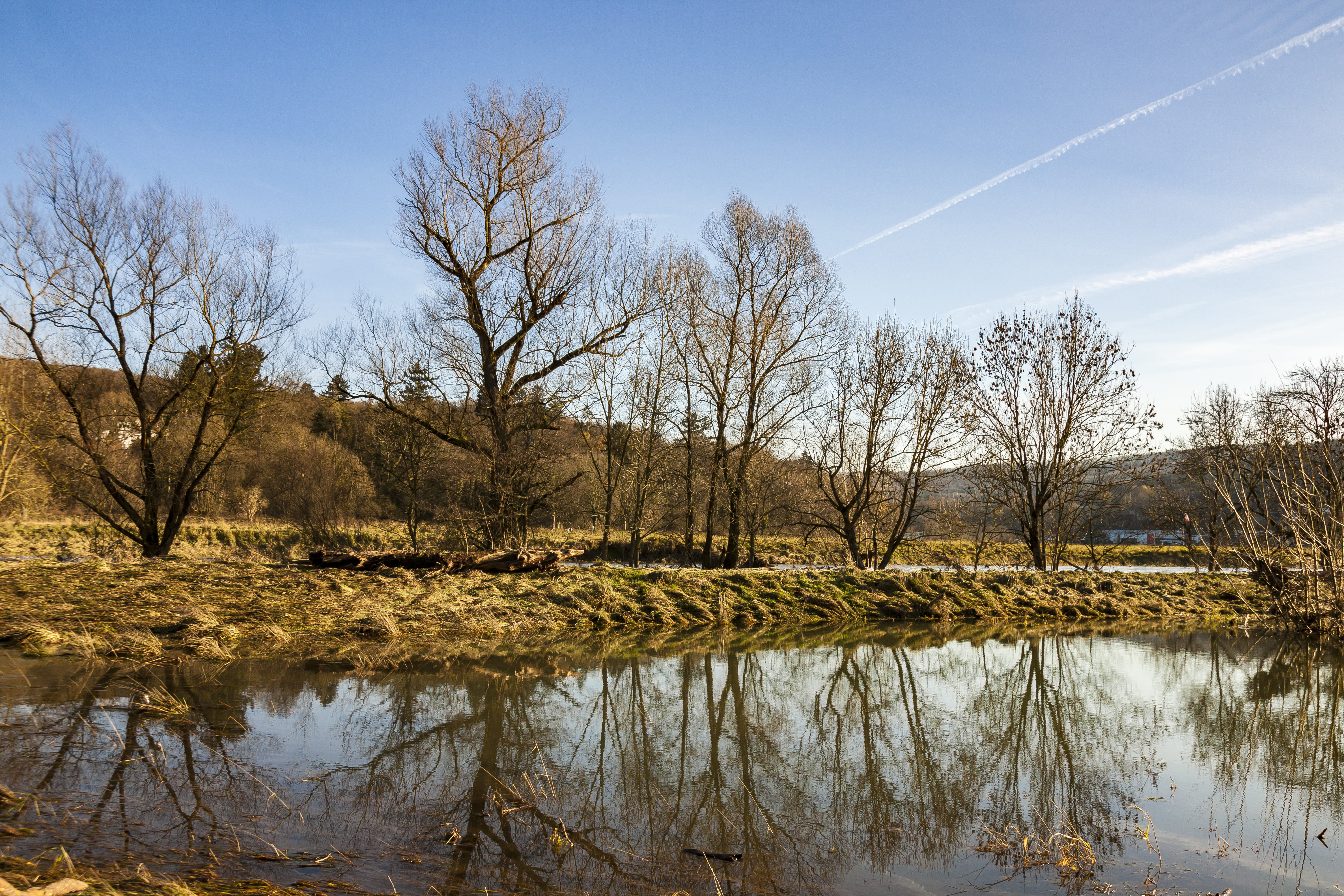 Hochwasser an der Ruhr bei Arnsberg, FFH-Gebiet DE-4614-303 „Ruhr“